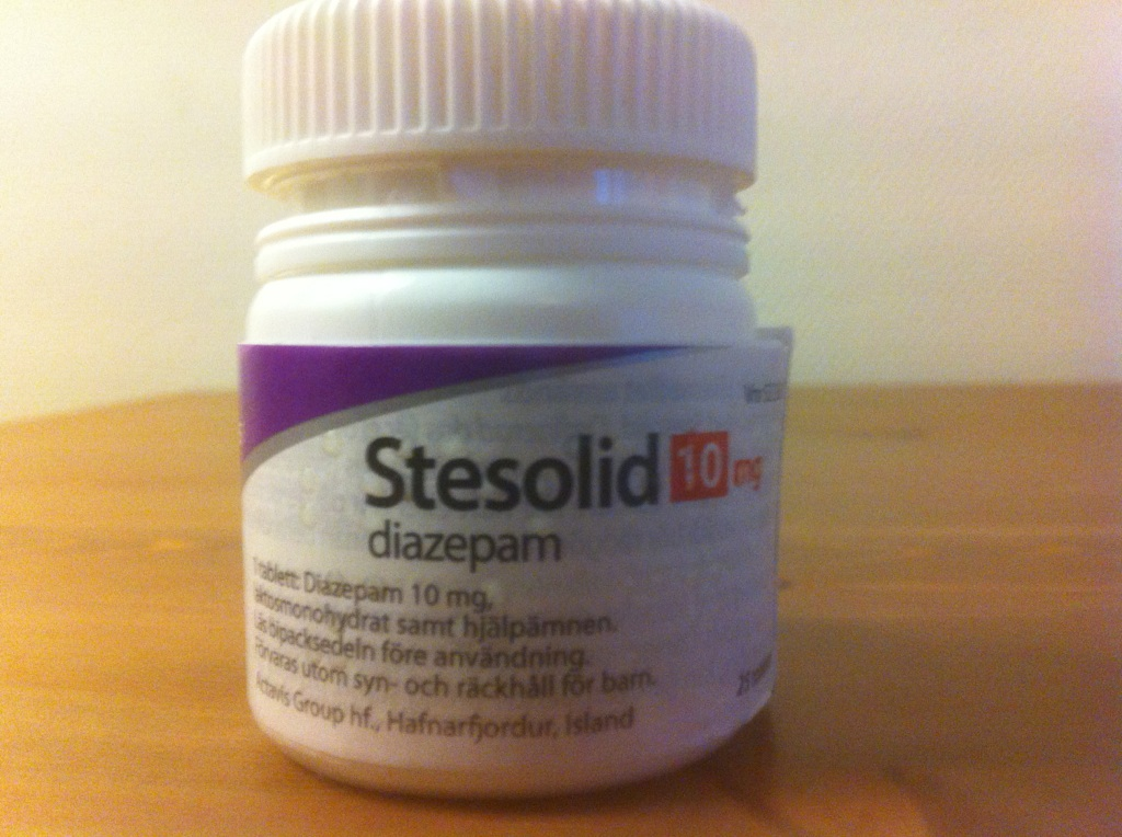 Burk med 25 tabletter Stesolid